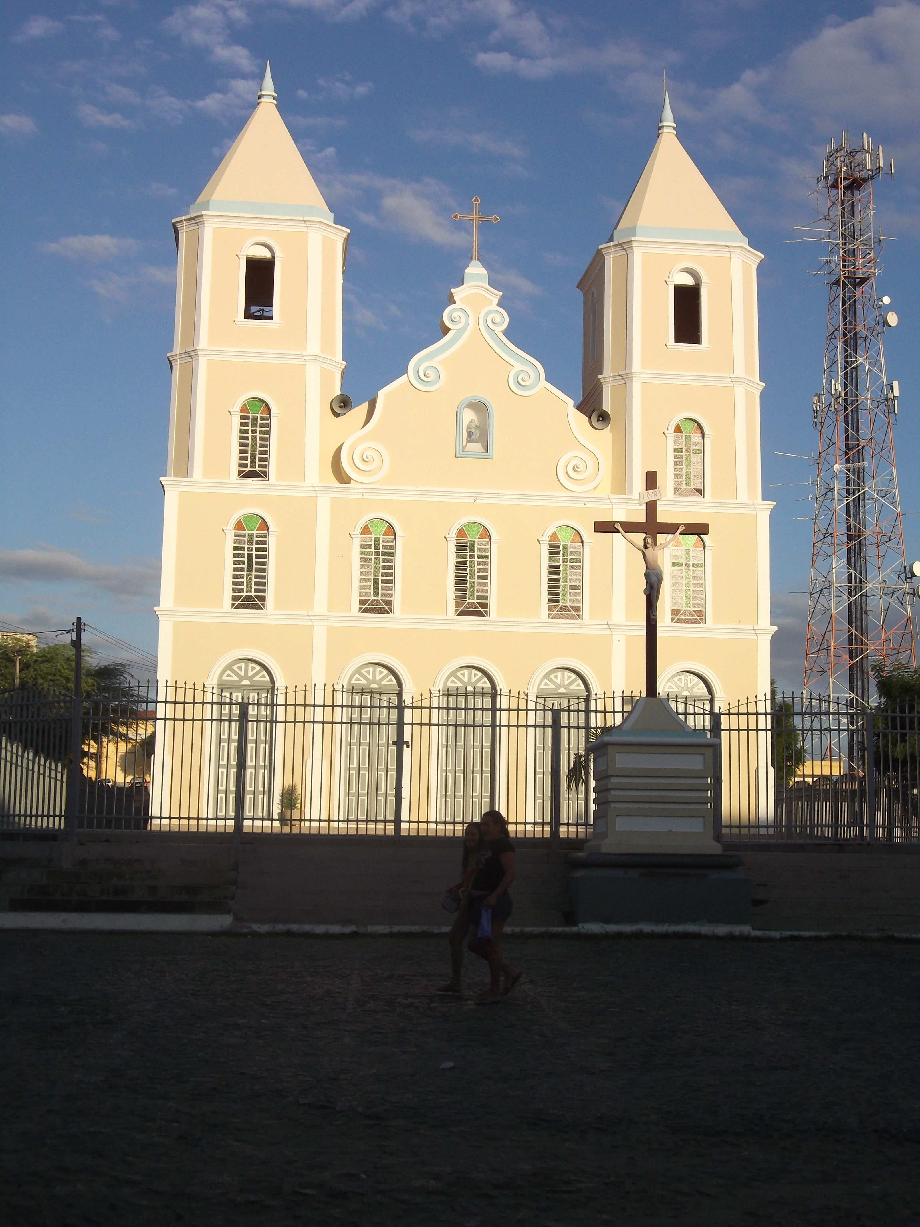 Igreja das Dores, Canindé, Ceará, Brasil